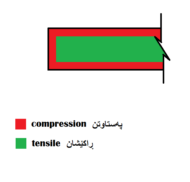 کوردی: tempered glass kurd